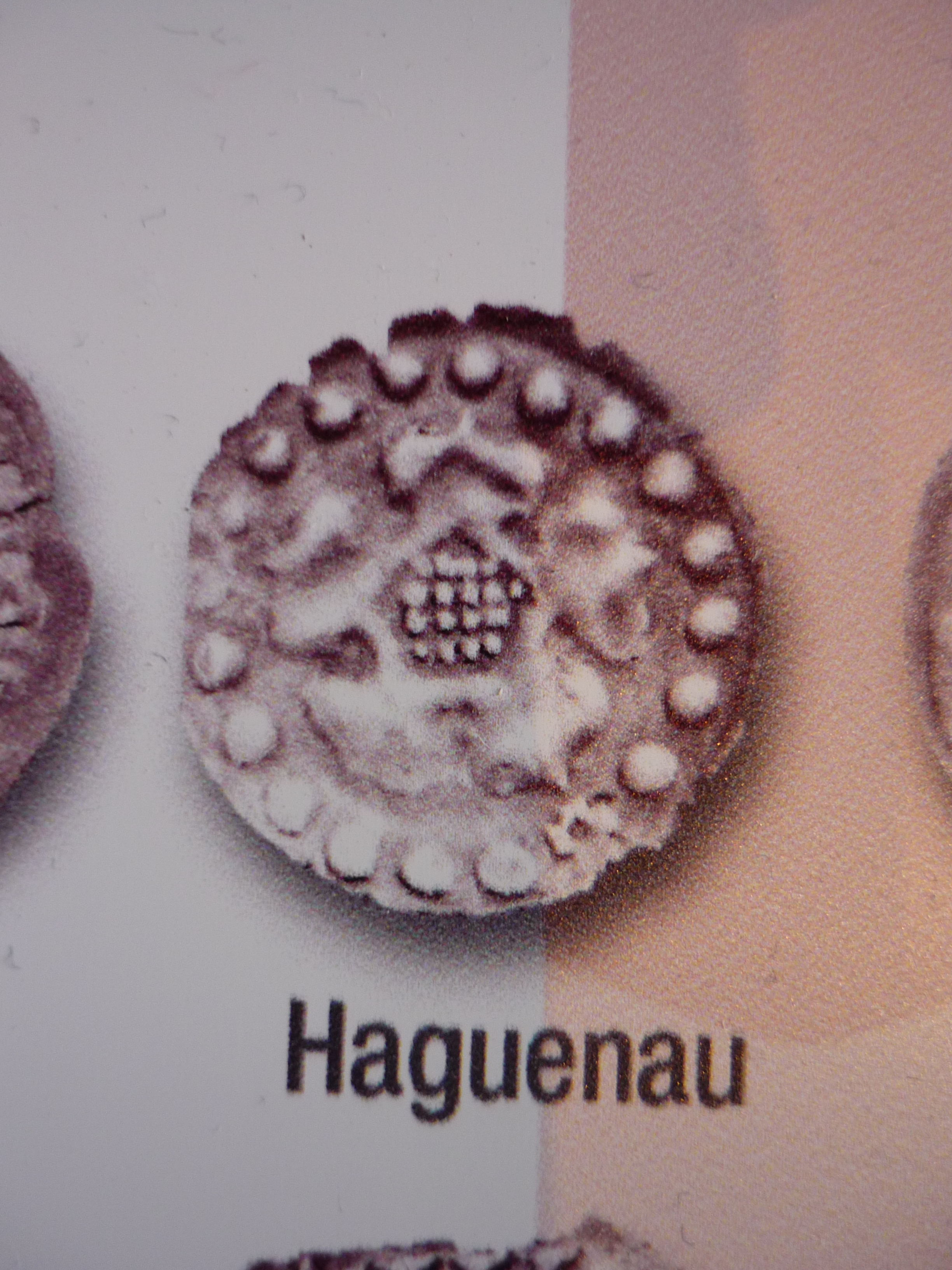 Monnaie de Haguenau du début du XVIIème siècle